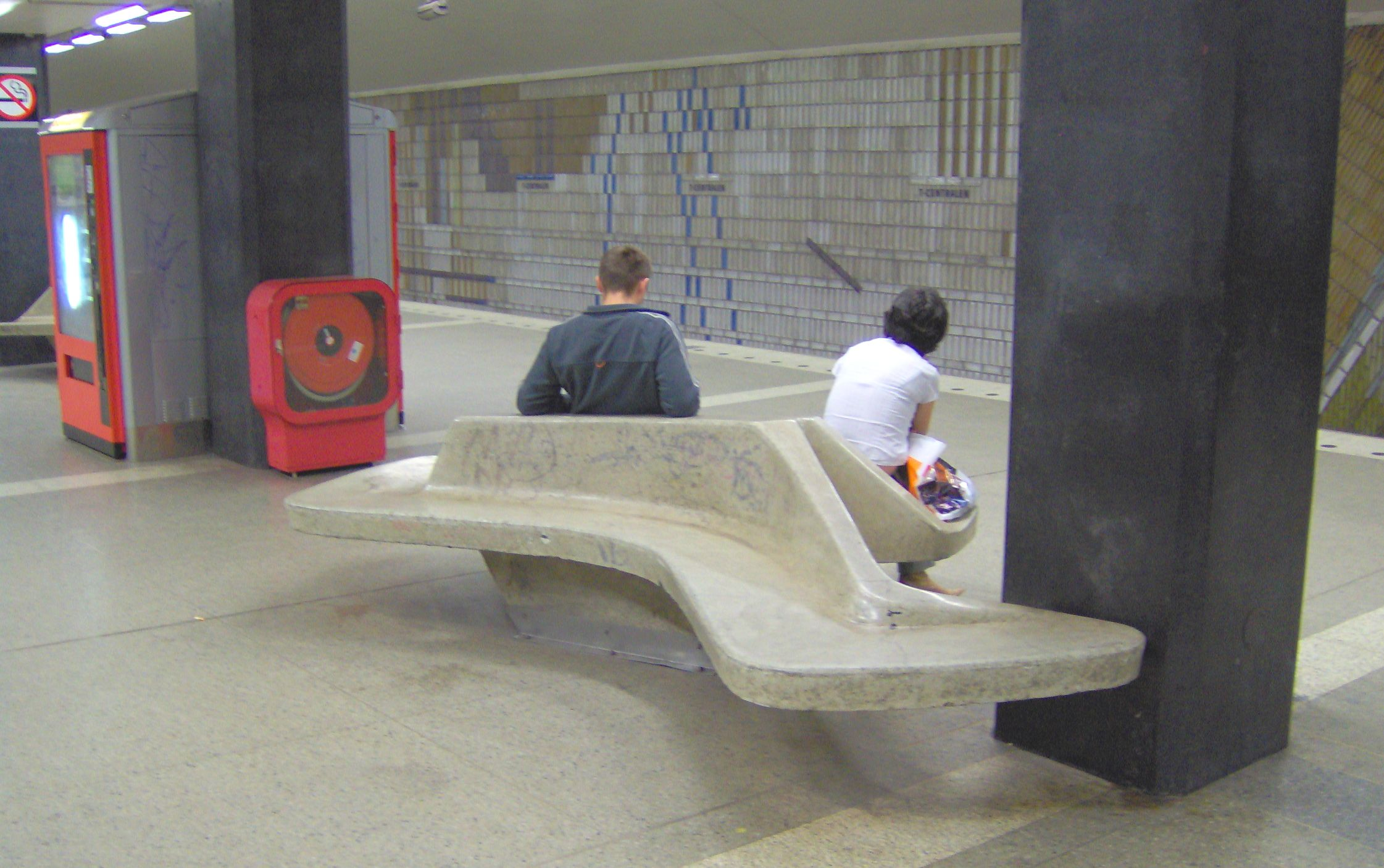 Formgiven soffa på T-centralen i Stockholm, Sweden